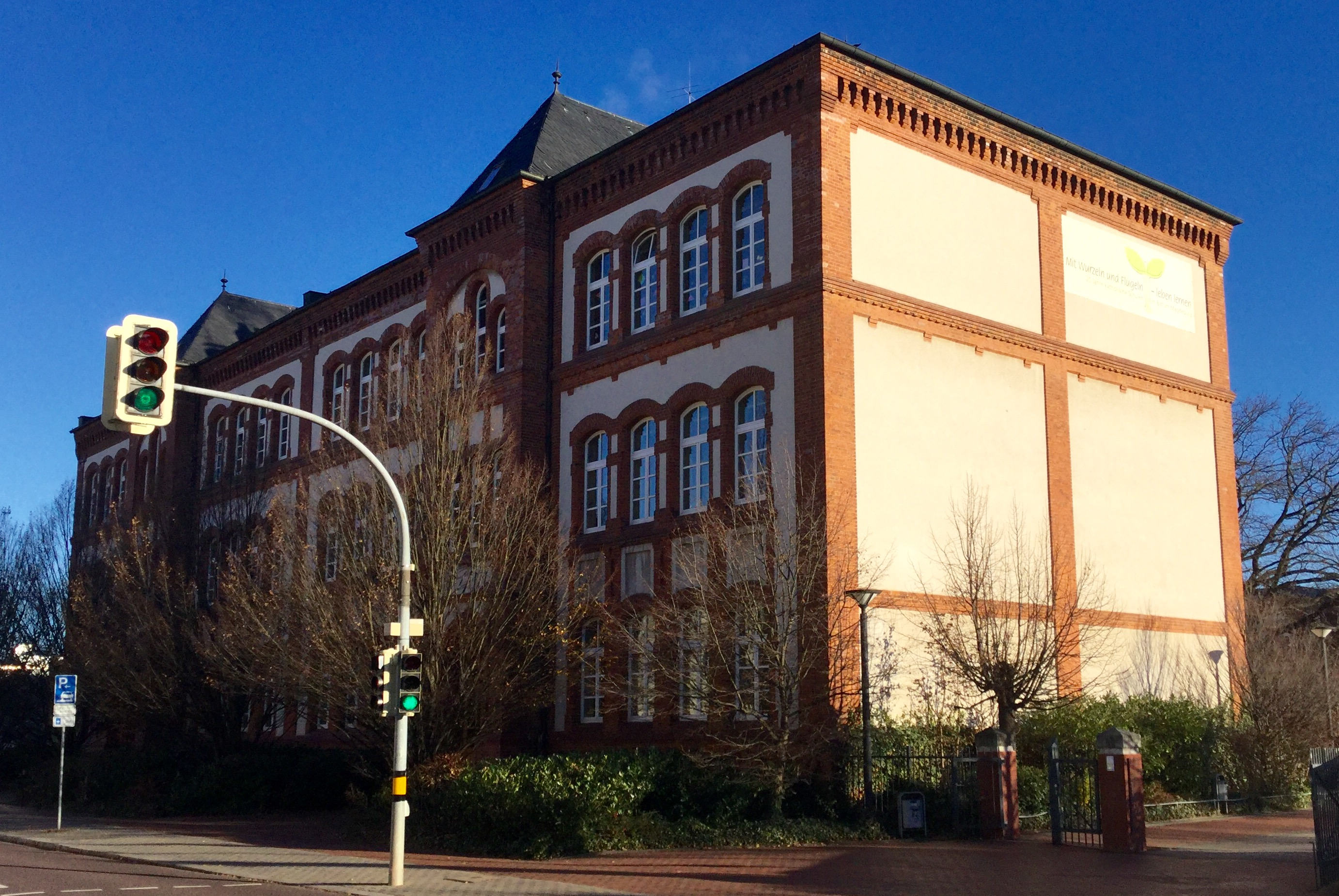 Norbertusgymnasium 2016